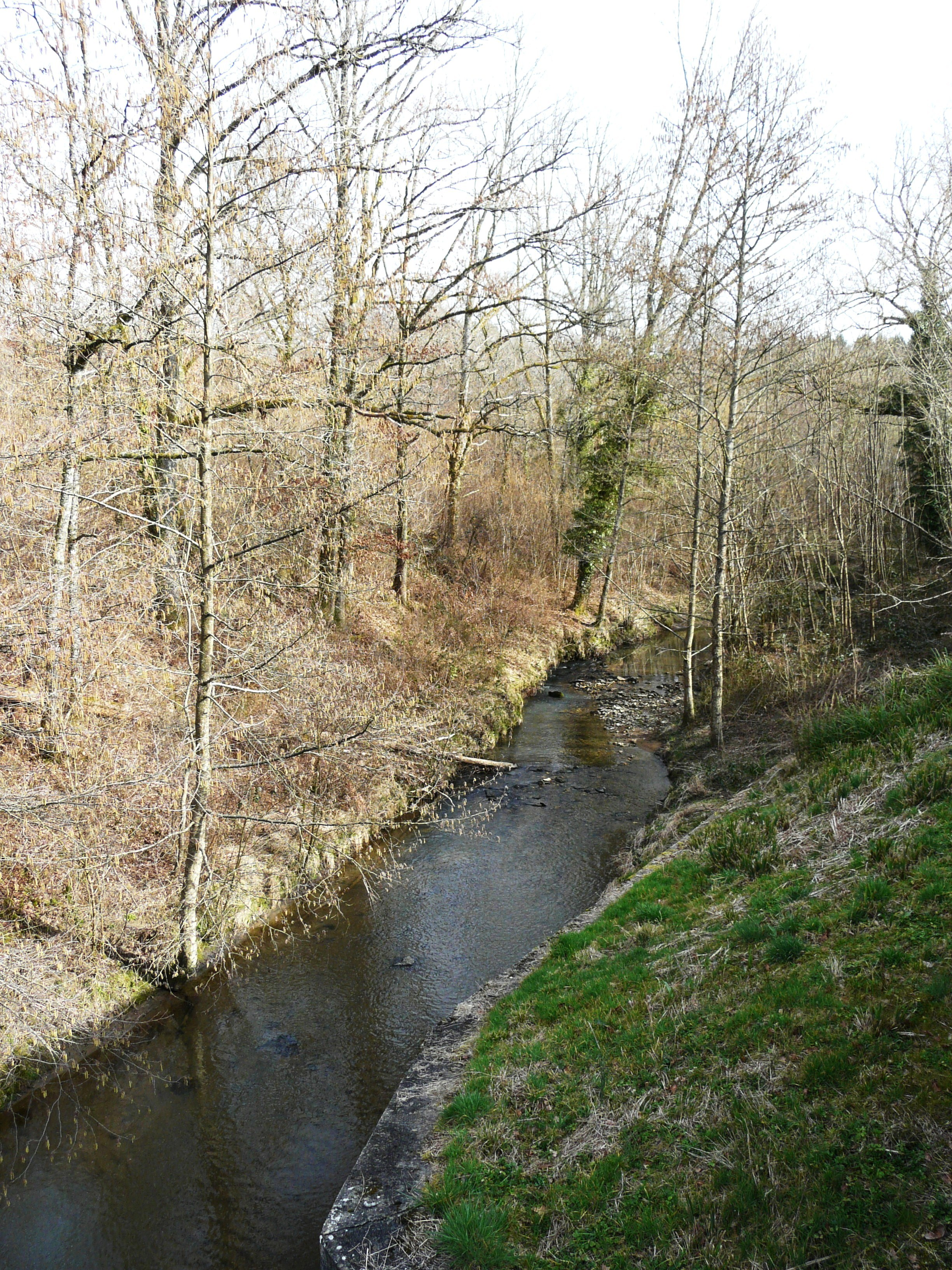 Le ruisseau de la Penchennerie en amont du pont de la RD 6, en limite des communes de Saint-Éloy-les-Tuileries et de Ségur-le-Château, Corrèze, France